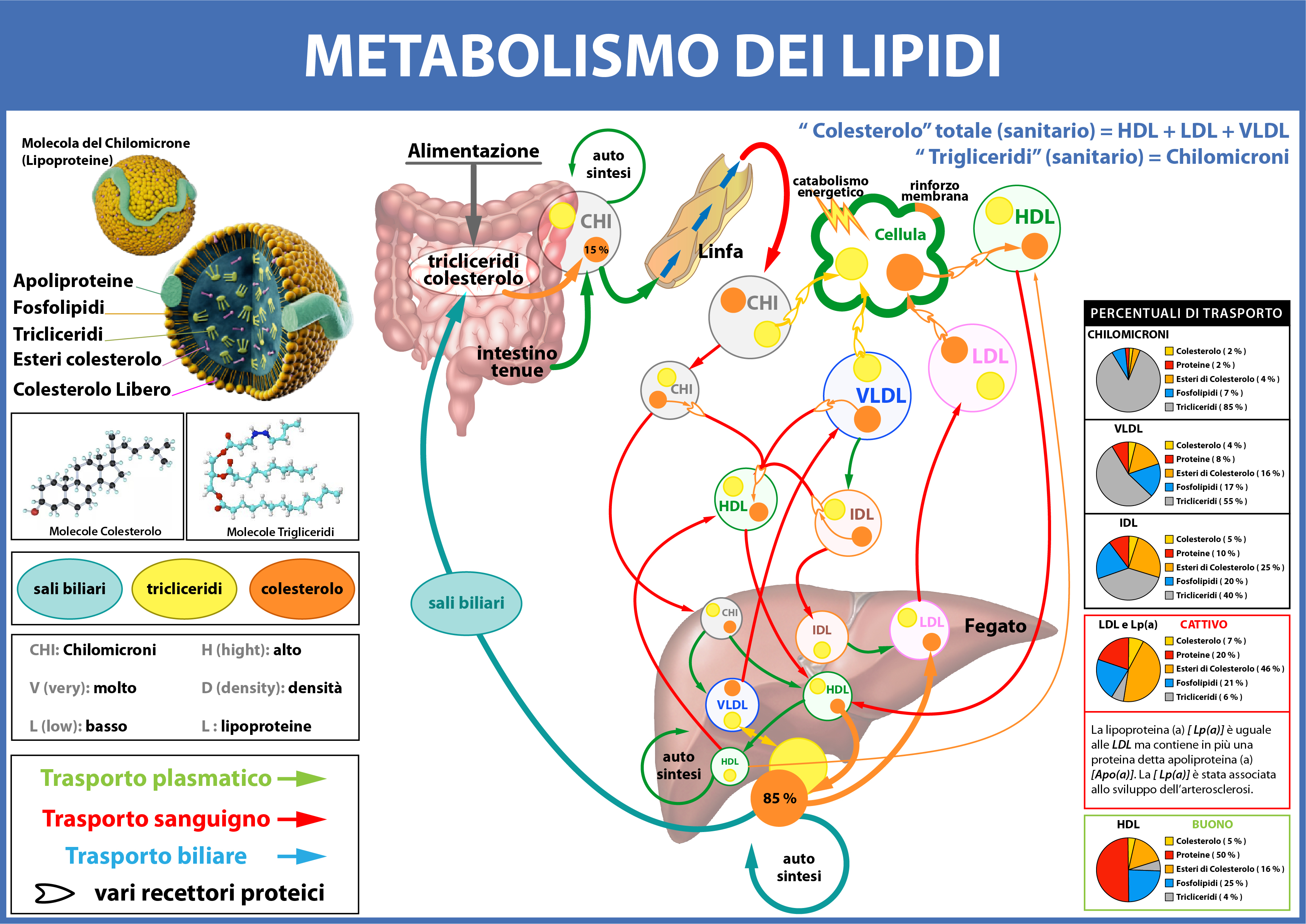 Logistica lipidica: trasporto di trigliceridi e colesterolo in organismi sotto forma di lipoproteine come chilomicroni, VLDL, LDL, IDL, HDL.